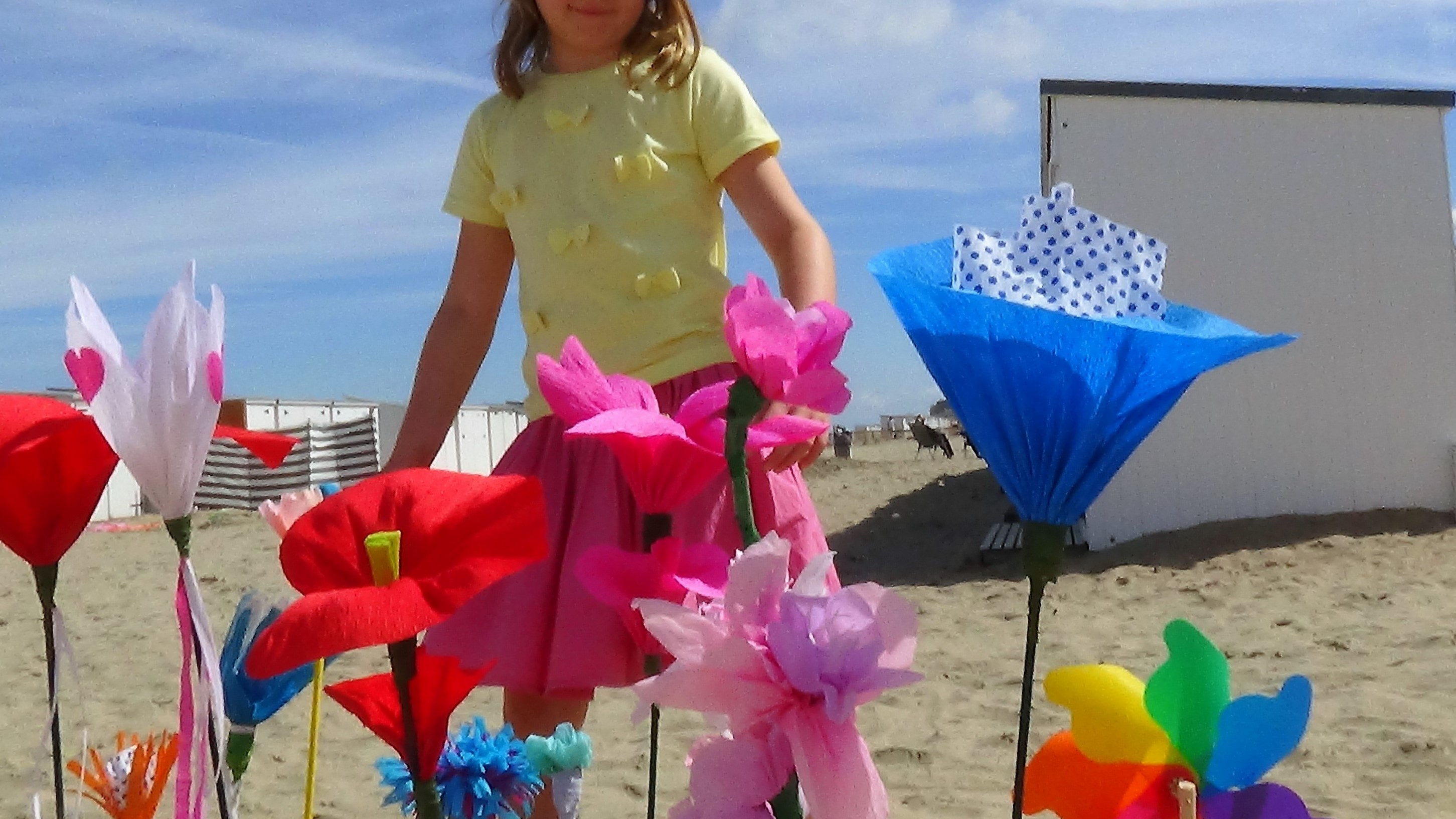 Magasin de fleurs à la plage